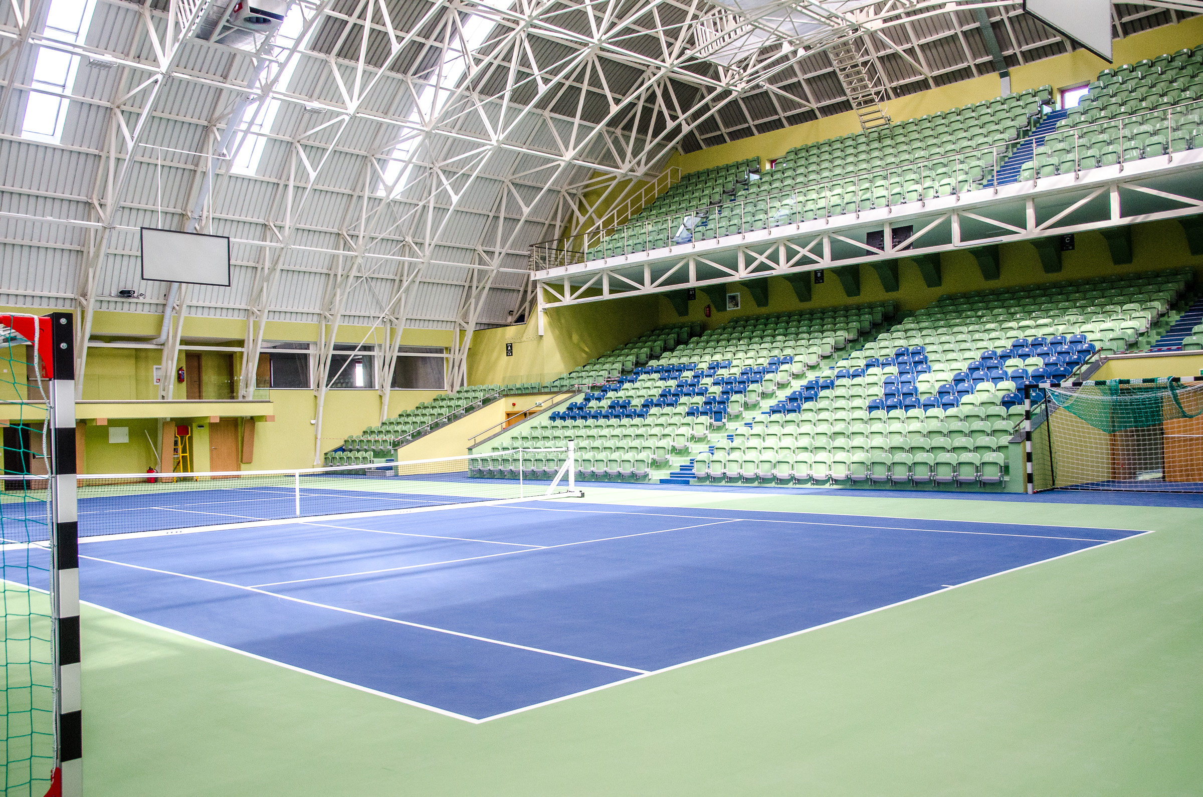 Тенис корт в Комплекс С.И.²Л.А.